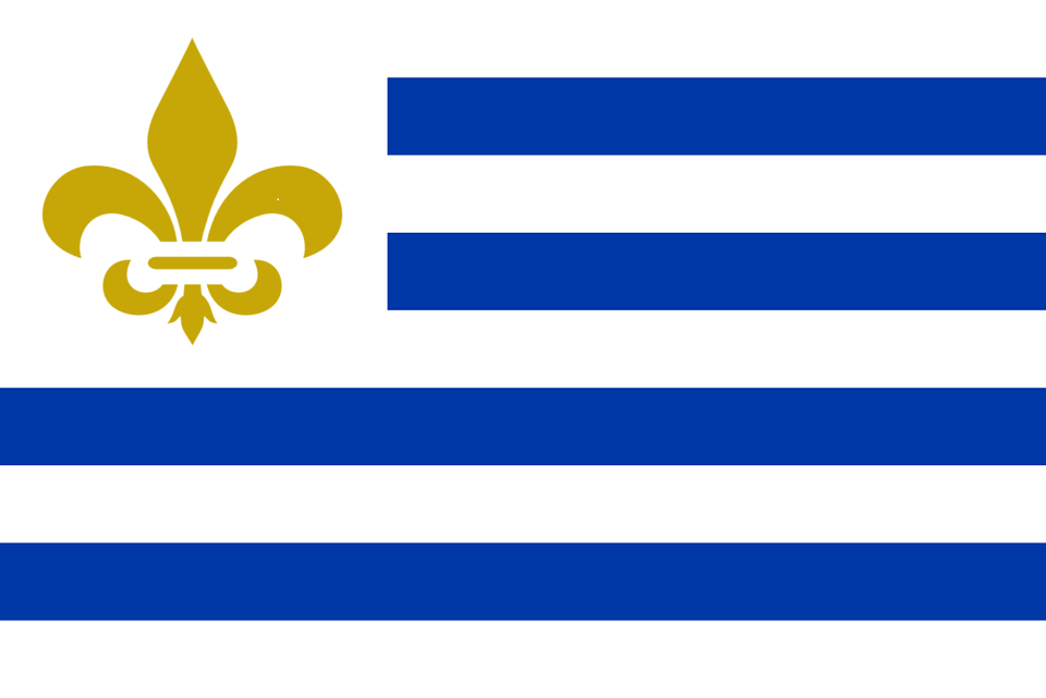 Bandera de la colectividad franco-uruguaya.